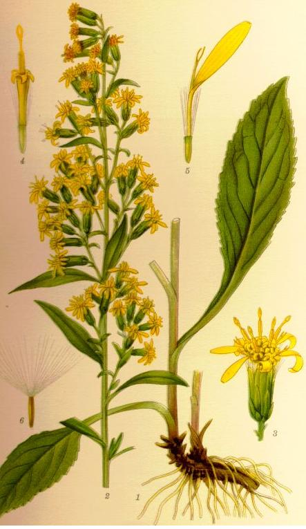 Gullris (Solidago virgaurea) jordstam med stjälkbaser, blomställningen ("spiran"), blomkork(3/1), mittblomma (4/1), kantblomma (4/1), frukt (4/1).